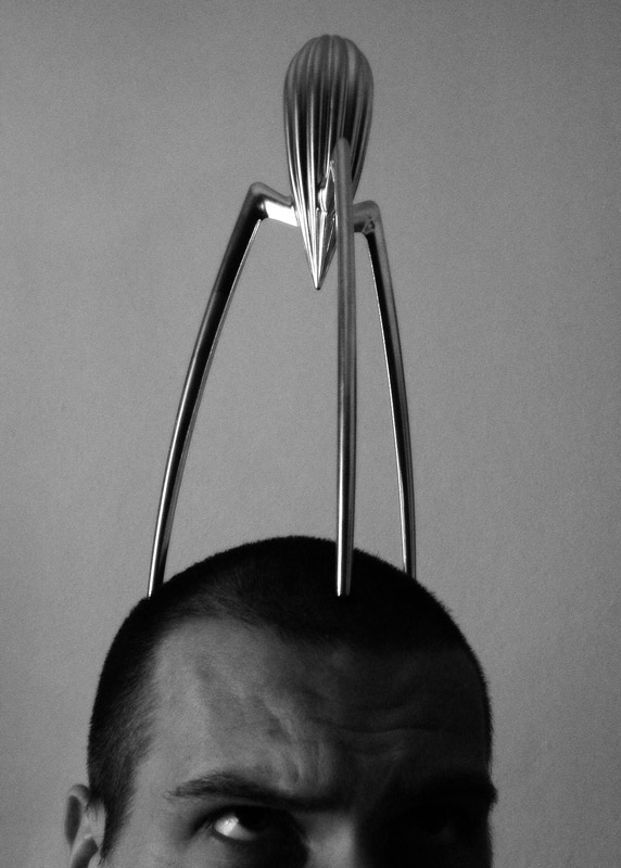 Bru + Juicy Salif (juicy salif lemon squeezer, made by Alessi, design Philippe Starck)